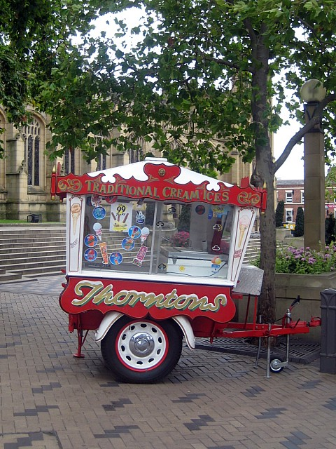 Ice cream cart